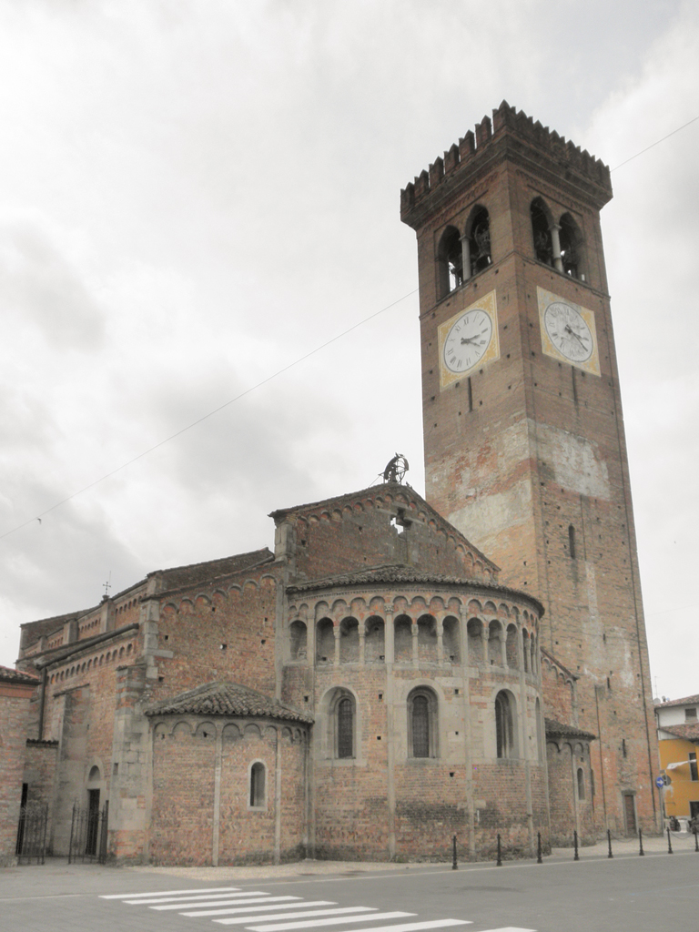 L'abside della chiesa di San Sigismondo a Rivolta d'Adda